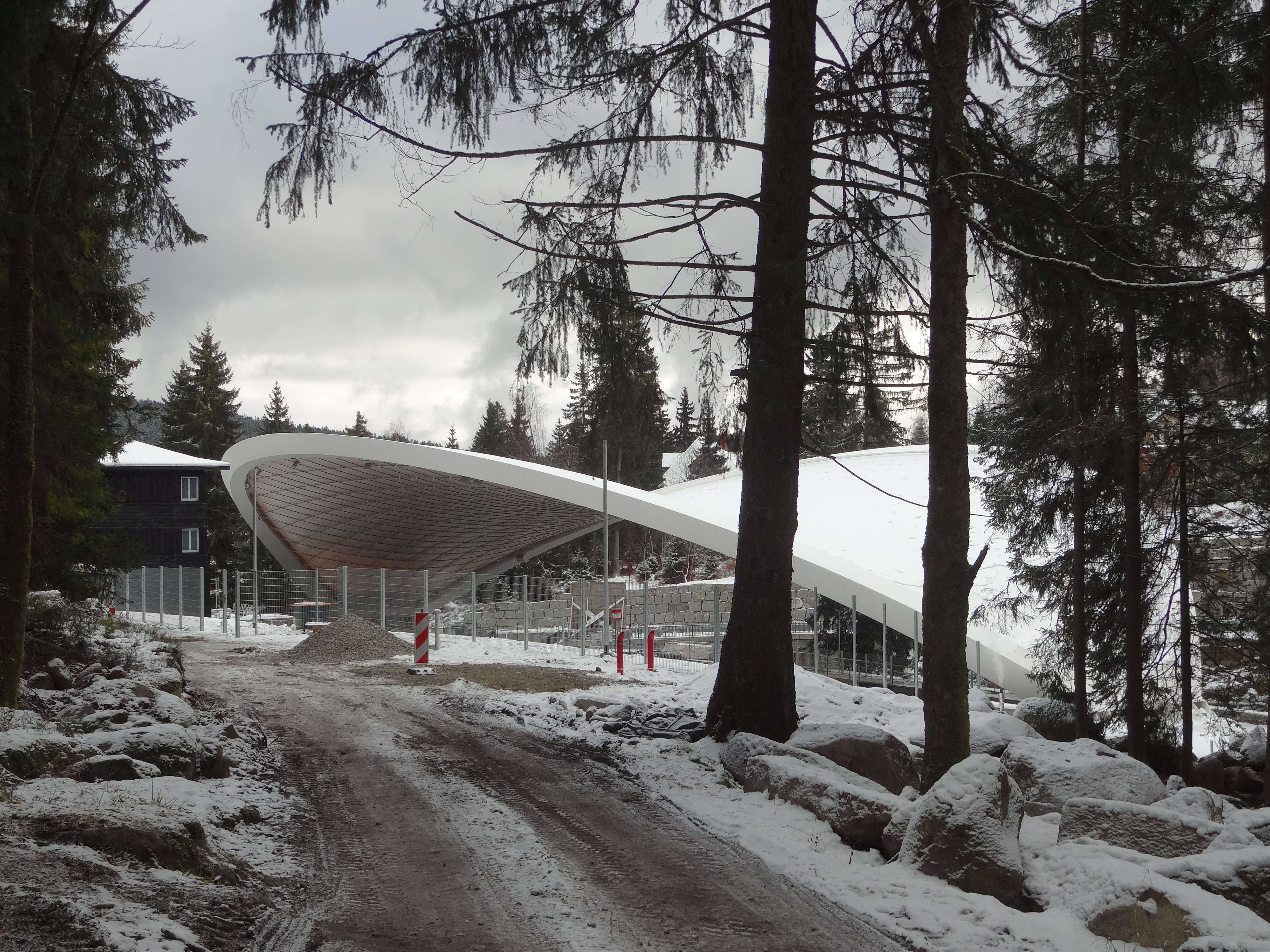 Schierker Feuerstein Arena in Schierke im Harz